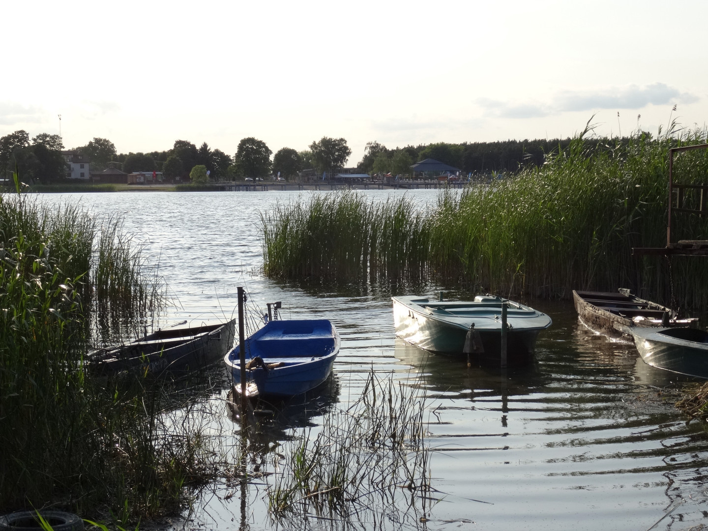 Prądocin - brzeg jeziora Jezuickiego, gmina Nowa Wieś Wielka, powiat bydgoski